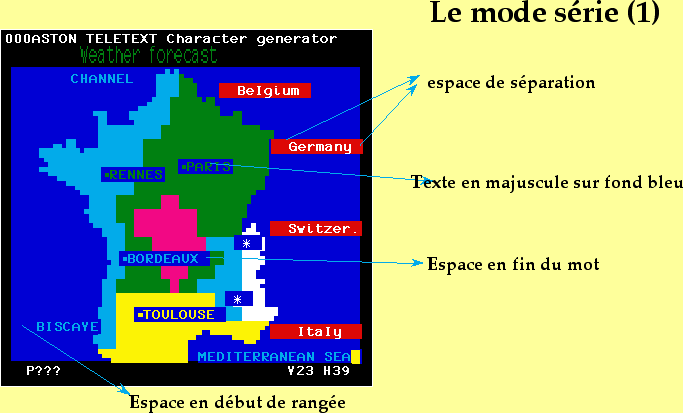 Extrait d'un cours donné à l'Université de Paris Dauphine sur l'histoire du Vidéotex : Page test en mode série